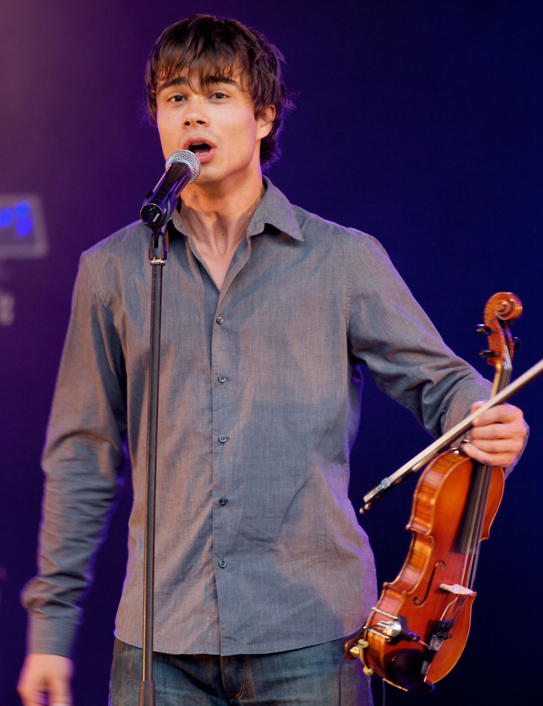 Alexander Rybak